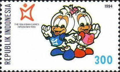 1994 Asian Games